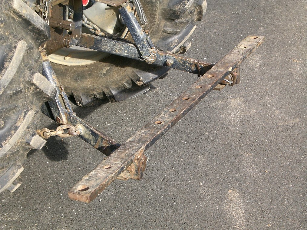 Ackerschiene eines Traktors